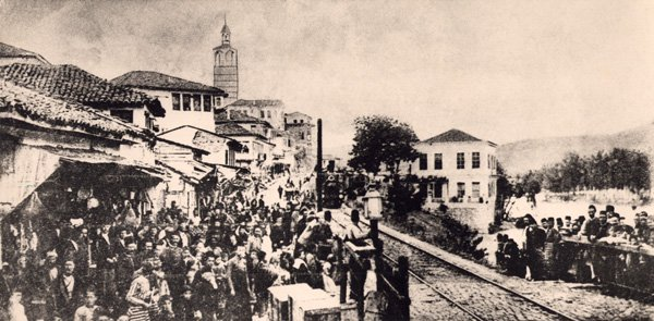 Свечен пречек на првиот воз од страна на граѓаните во Велес 1873 година.